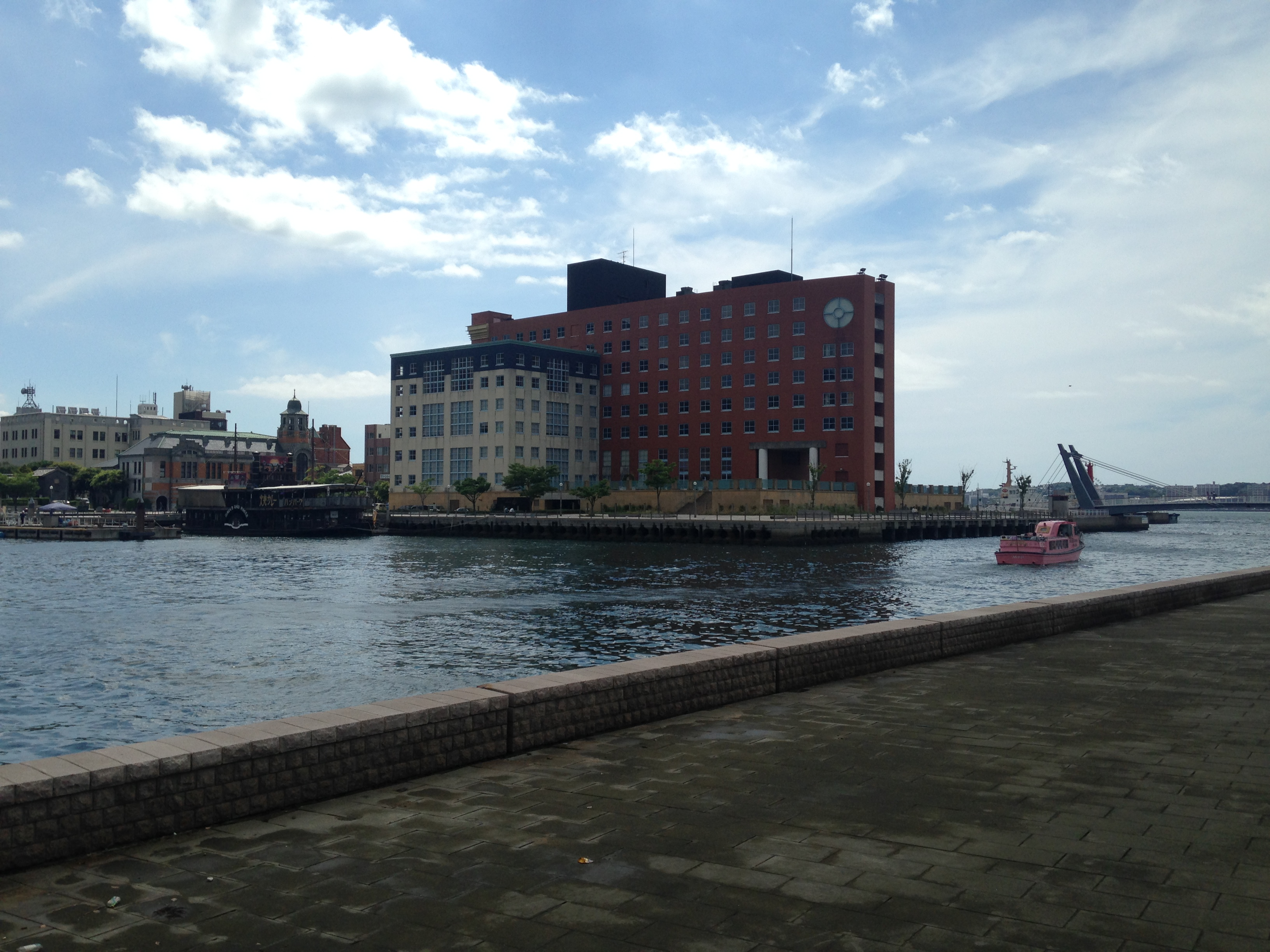 門司港ホテル